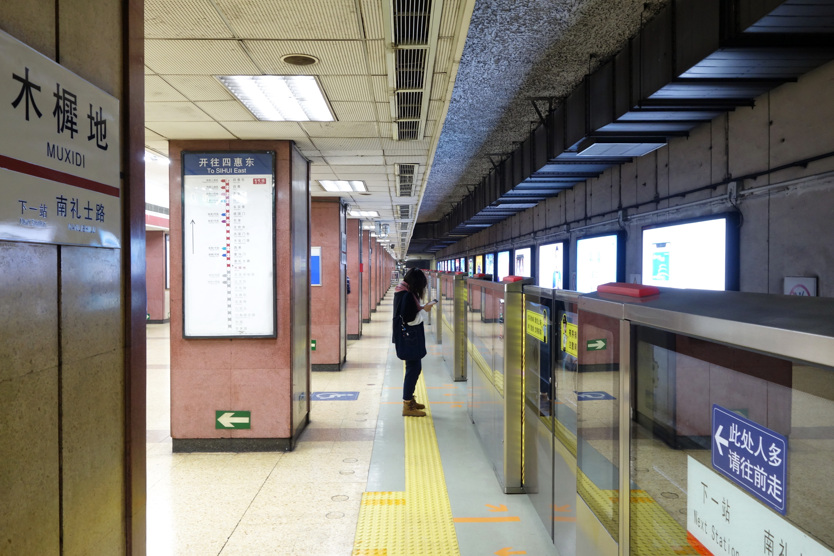 北京地铁1号线木樨地站站台，站台加装半高式屏蔽门，2017年8月投入使用。